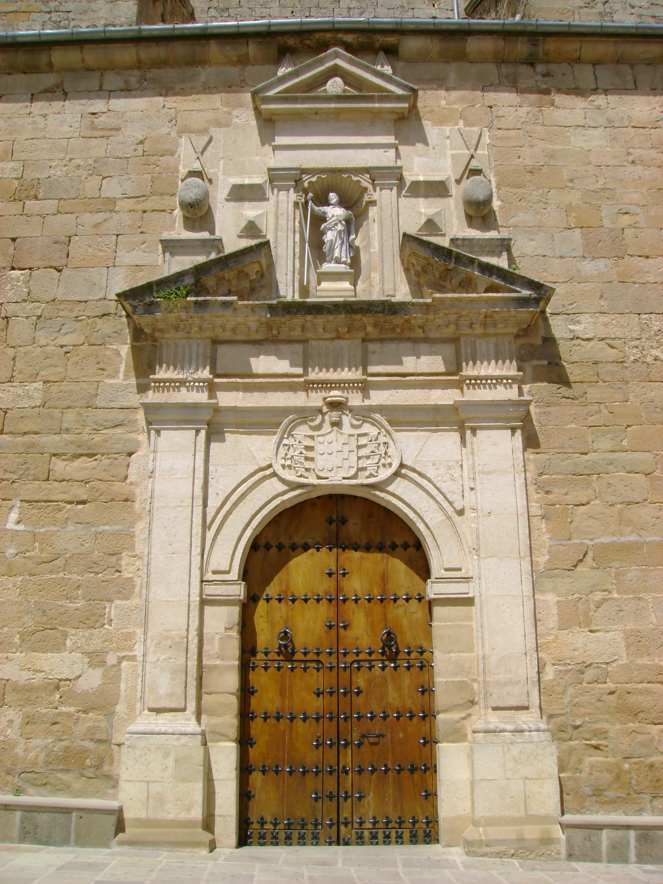 Portada de la iglesia de San Andrés en Villanueva del Arzobispo.